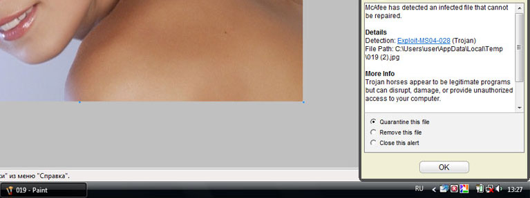 Безопасная активация протрояненого jpg-изображения. Антивирус диагностировал и блокировал угрозу. Скриншот 2010 года.